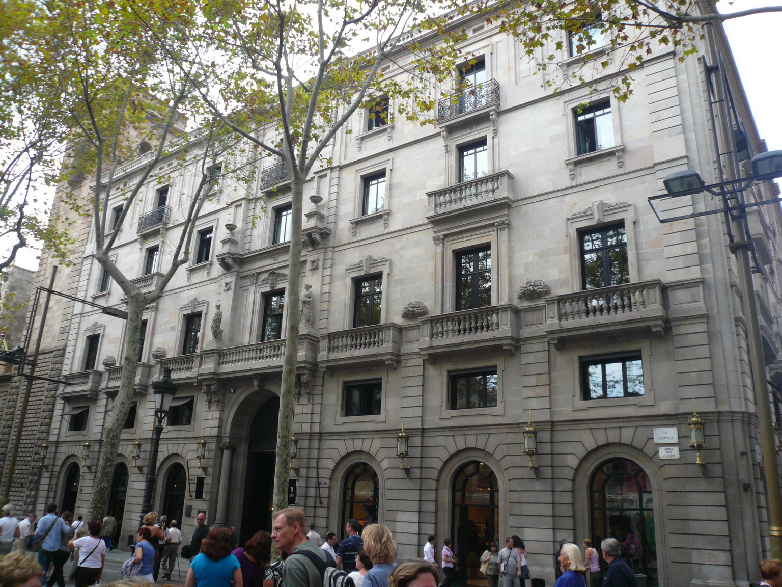 Companyia de Tabacs de Filipines (Barcelona).